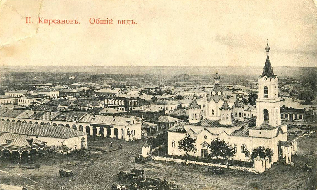 Кирсанов. Общий вид. Ильинская церковь и торговые ряды XIX века (фото-открытка нач.XX века).